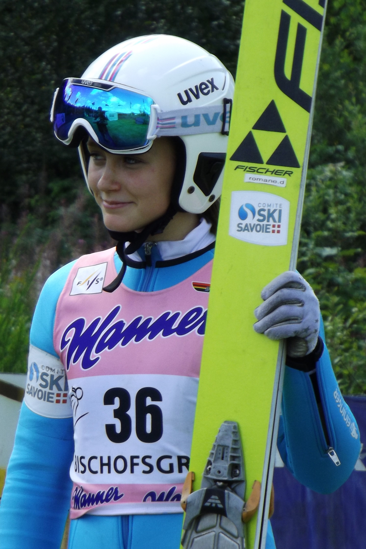 Französische Skispringerin Romane Dieu